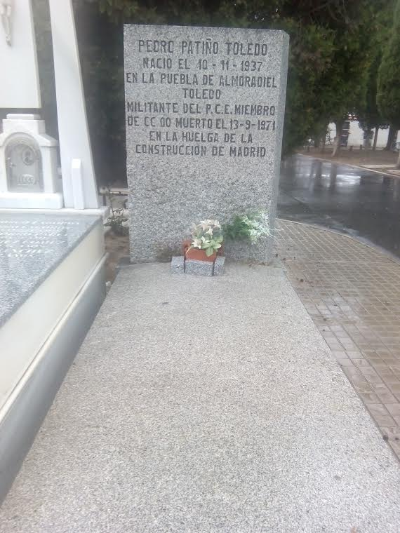 Los restos del sindicalista descansan en el cementerio municipal de Getafe